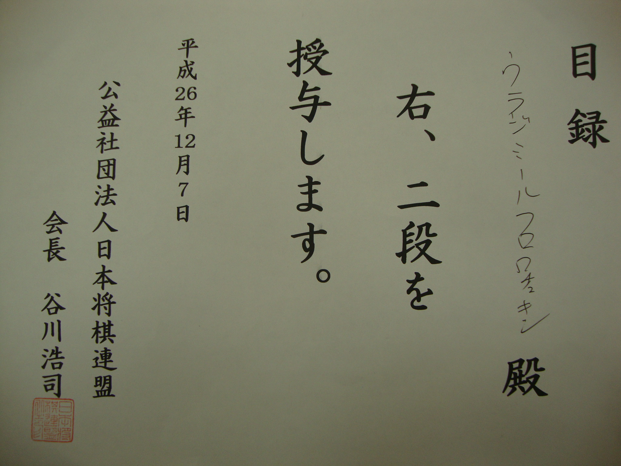 Официальное удостоверение 2-го дана по сёги (выдан В. Фролочкину на 6-м Международном форуме сёги)